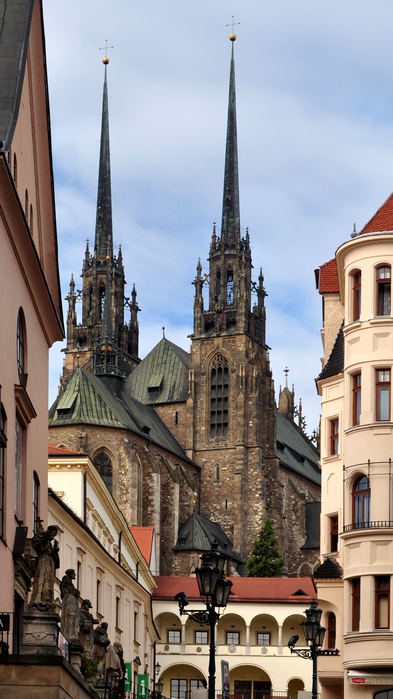 Katedrála brněnské diecéze v Brně na Petrově